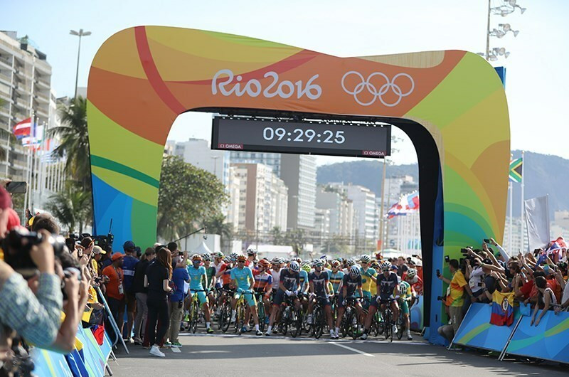 Road cycling at the 2016 Summer Olympics